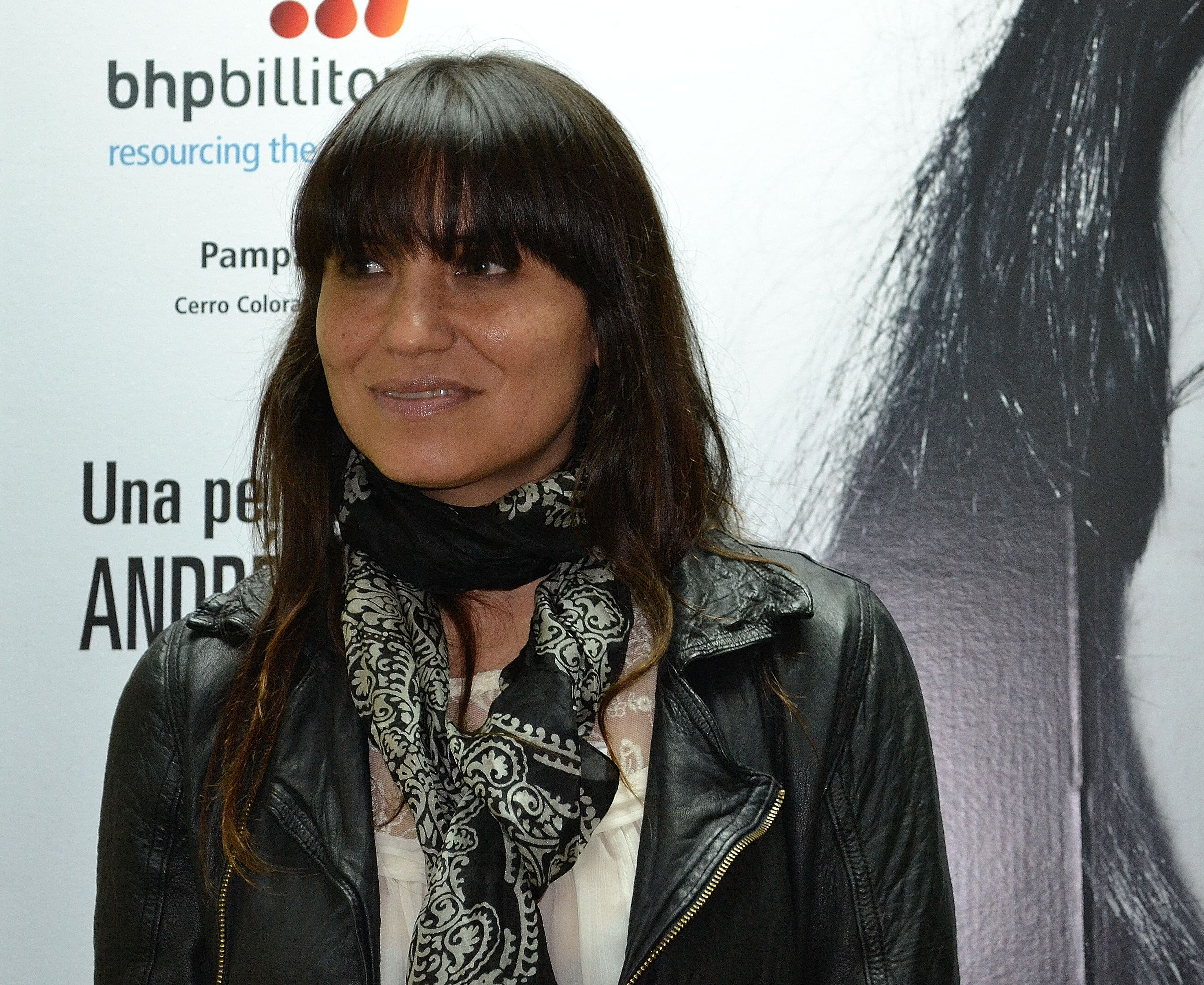 Francisca Gavilán, chilean actress.